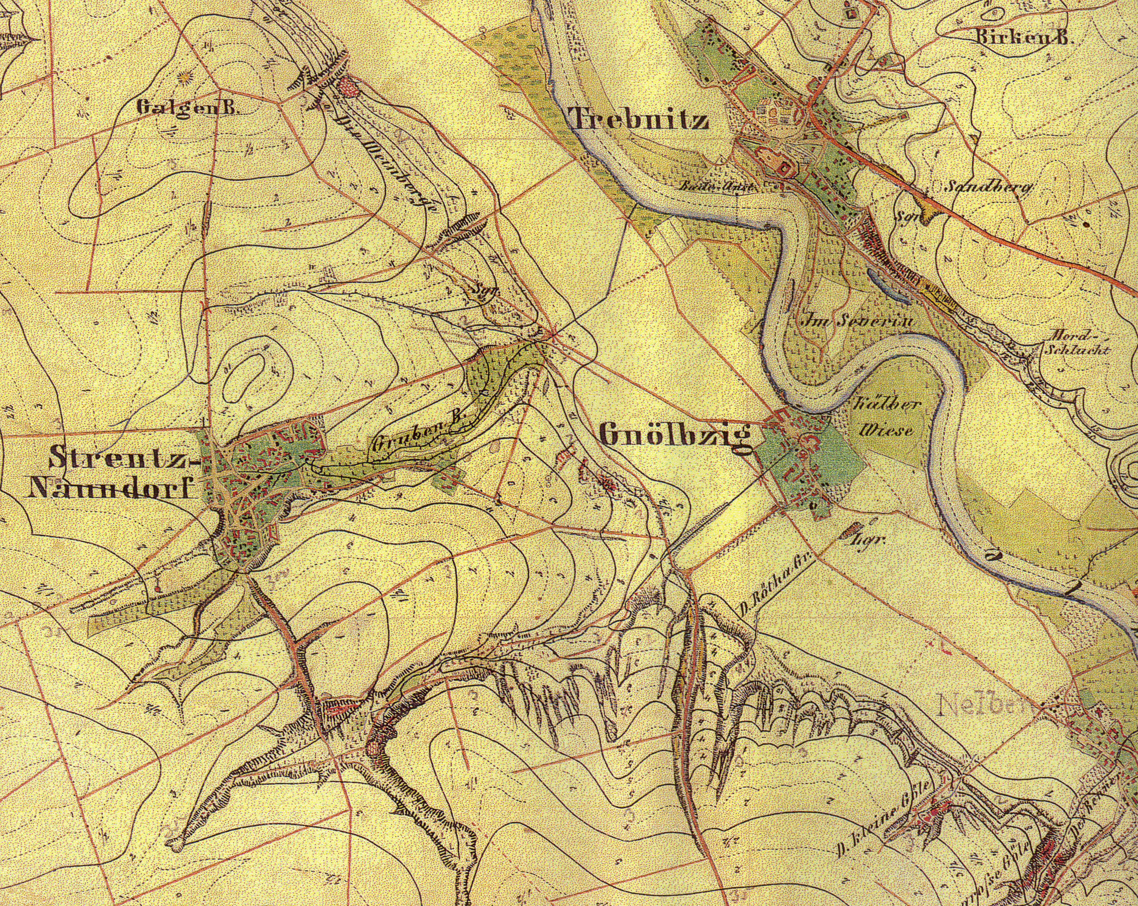 Ausschnitt aus dem Preußischen Urmesstischblatt 1:25.000, 2458, Cönnern (Könnern), 1852